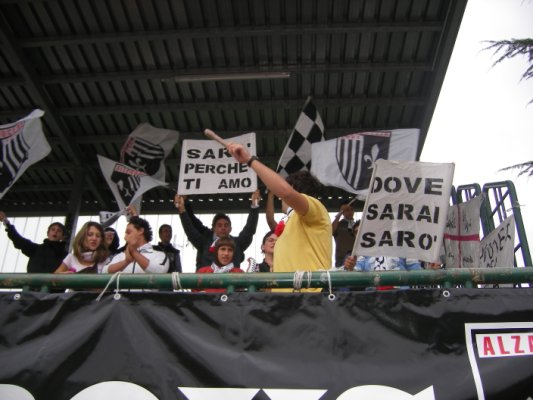 ultra alzano